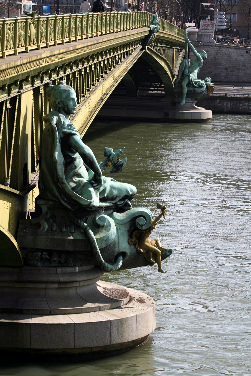 Jean-Antoine Injalbert (french: 1845-1933): La Ville de Paris et La Navigation, 1897, Figures monumentales en bronze, Paris, Pont Mirabeau.